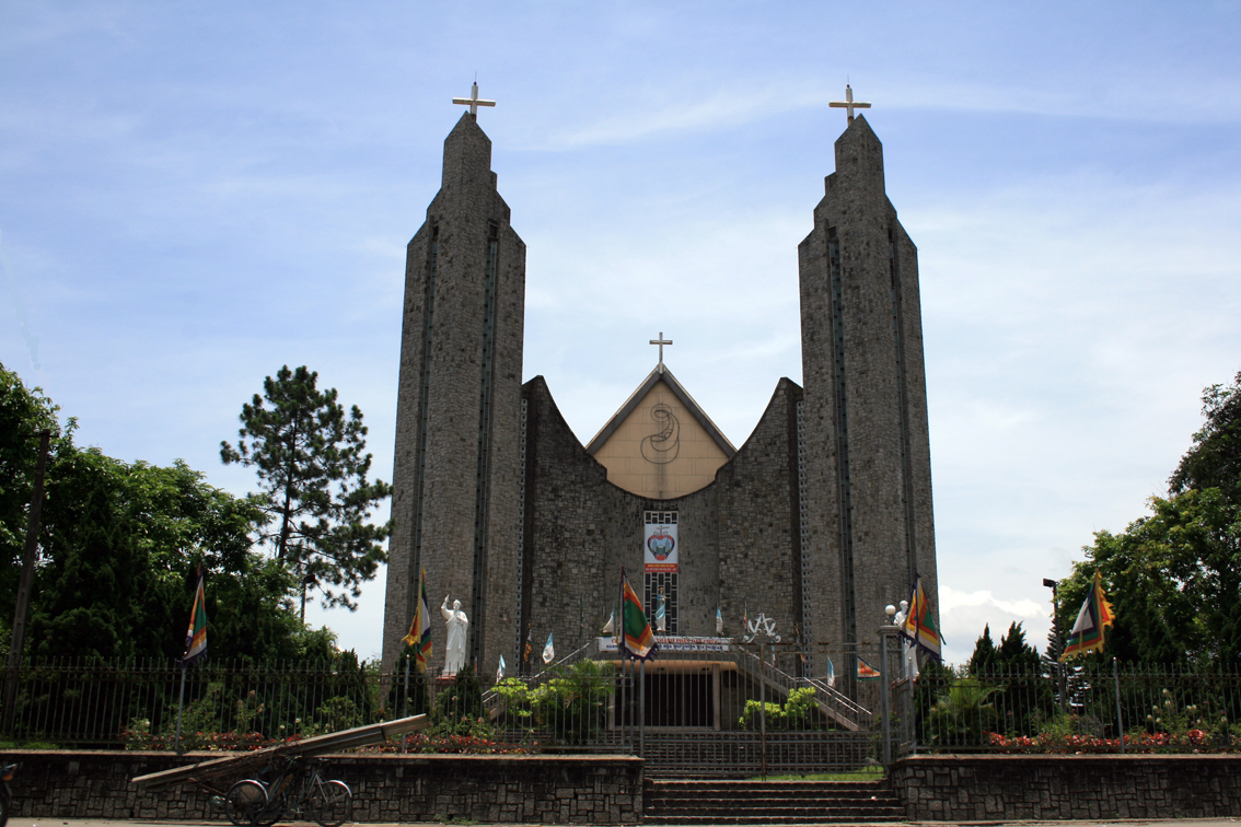 Nhà thờ Phủ Cam, Huế, Việt Nam